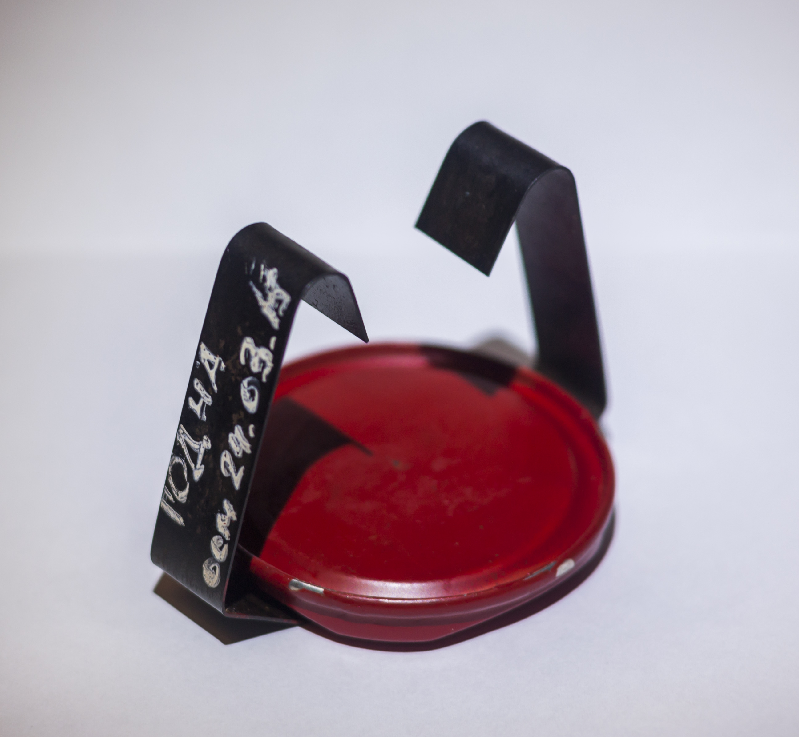 Железнодорожная петарда, металлические ножки для крепления к головке рельса.